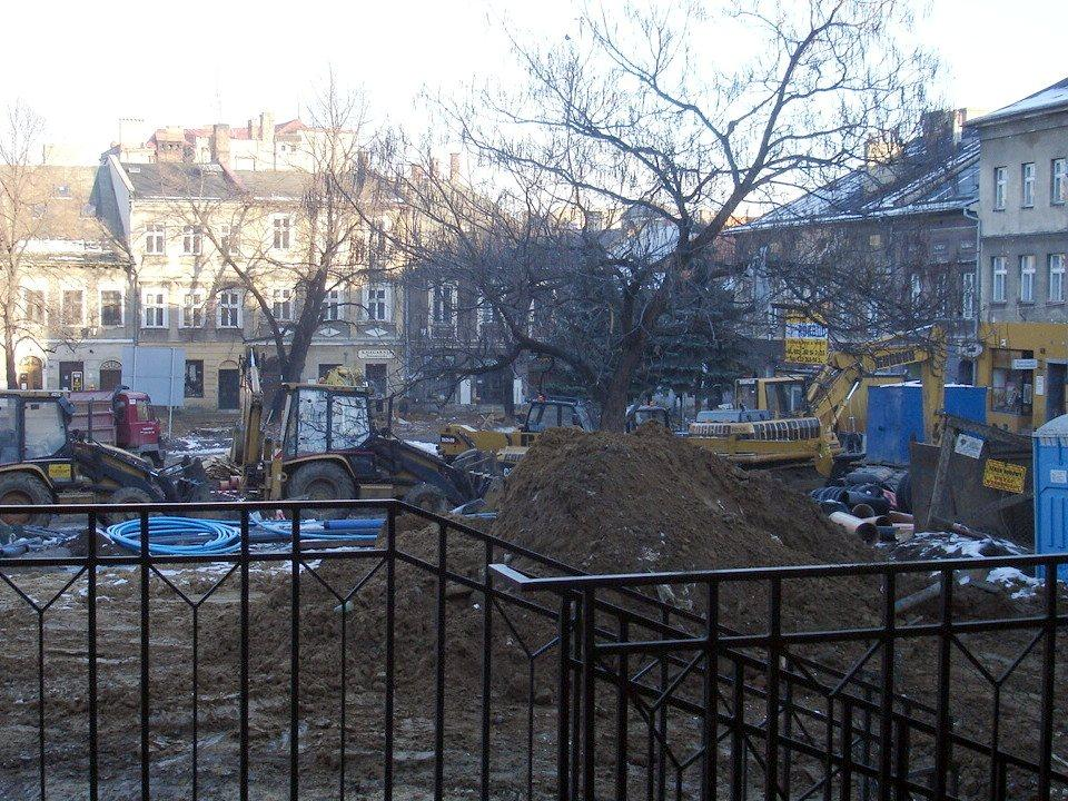 Rynek podczas przebudowy płyty - grudzień 2005.